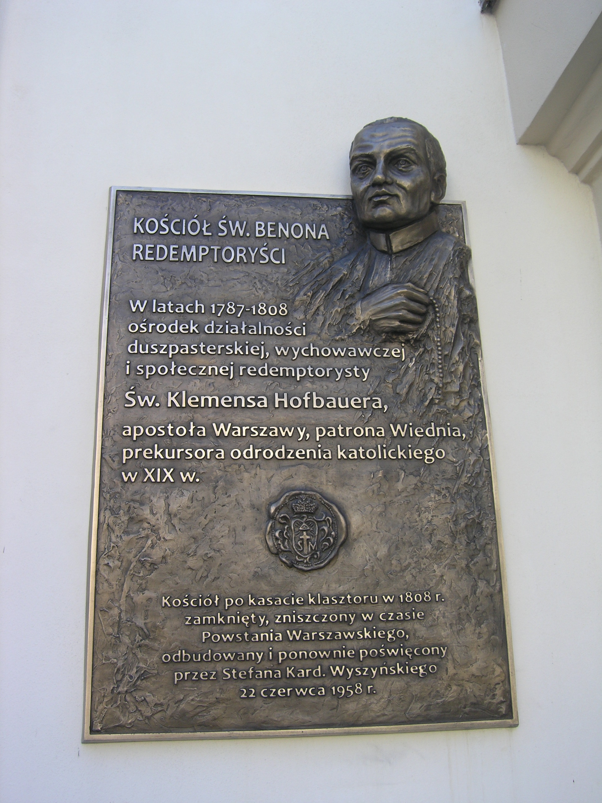 Tablica poświecona św. Klemensowi Marii Hofbauerowi na Kościele św. Benona przy ul. Piesza 1 w Warszawie